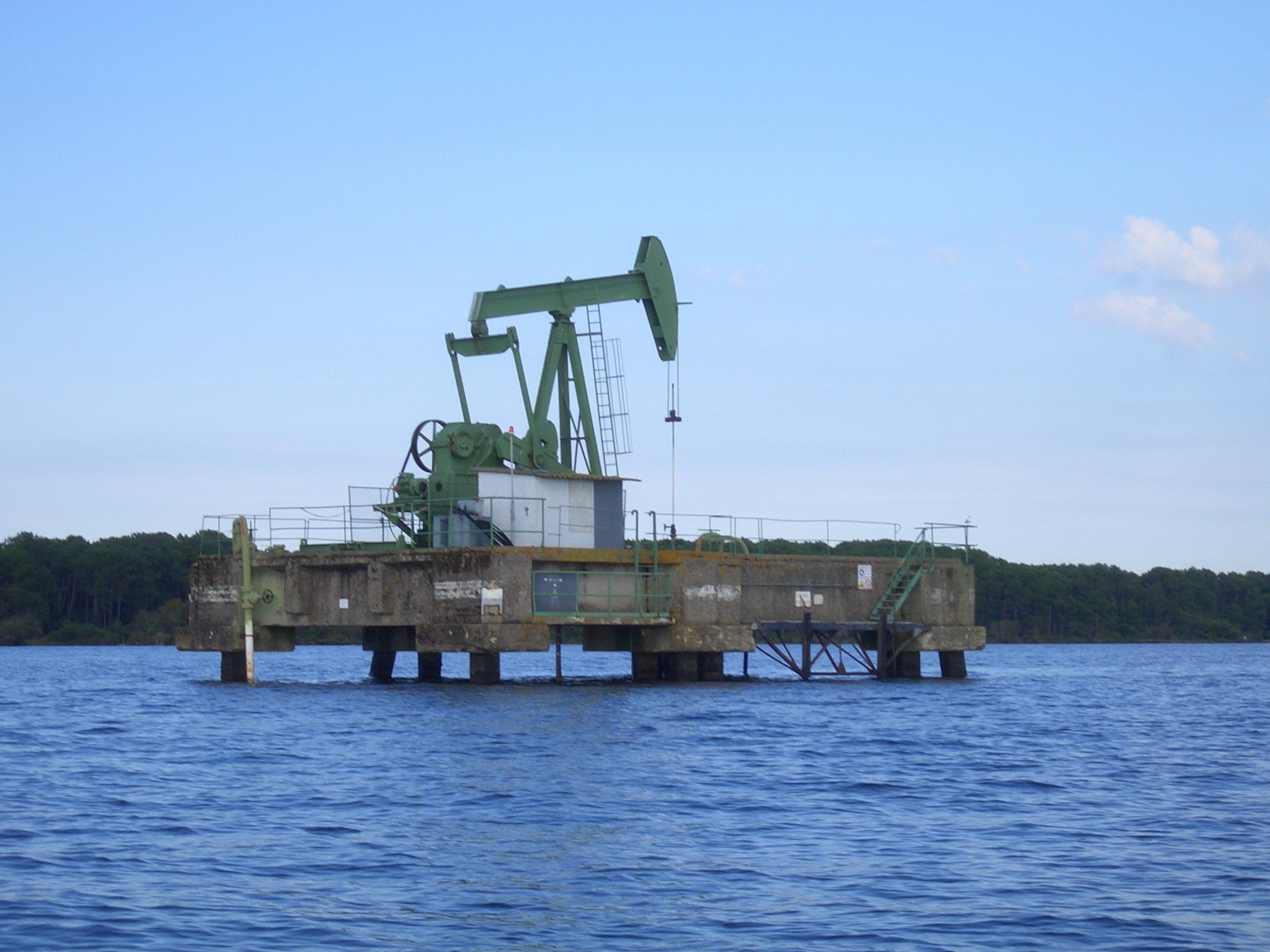 Station de pompage pétrolifère du lac de_Parentis.